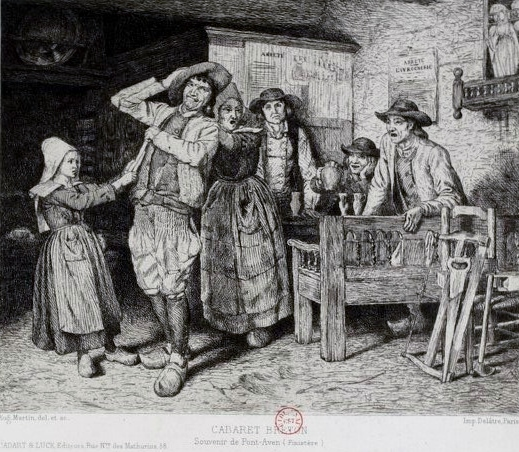 Eugène Martin : Cabaret breton. Souvenir de Pont-Aven, gravure publiée dans L'Illustration nouvelle par une société de peintres-graveurs à l'eau-forte, première année, premier volume, 1868 .)